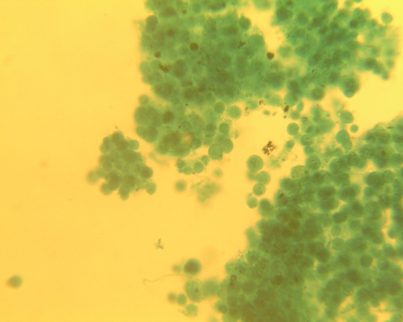 طحالب خضراء (كلاميدوموناس)